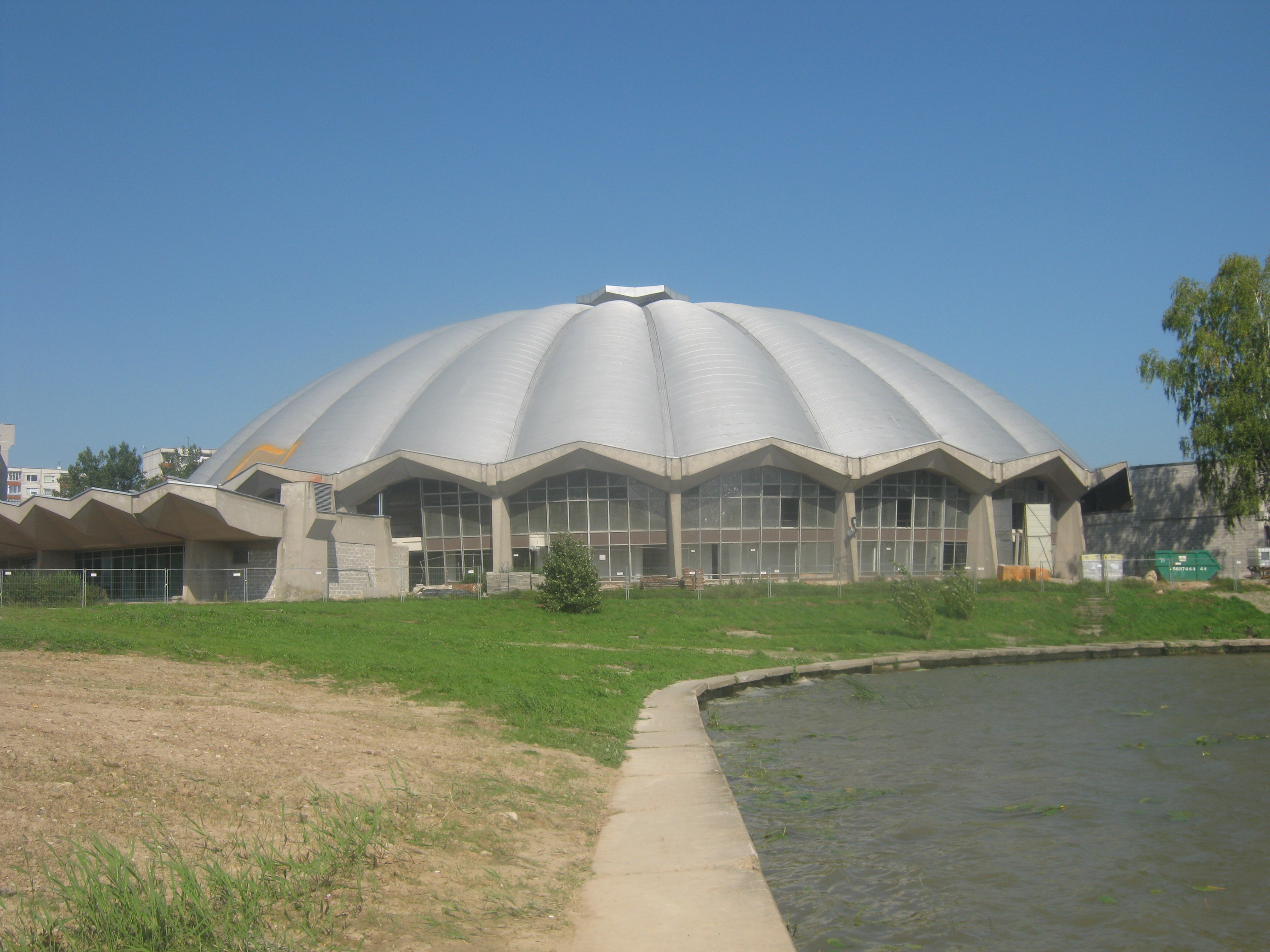 Elektrėnų ledo halė